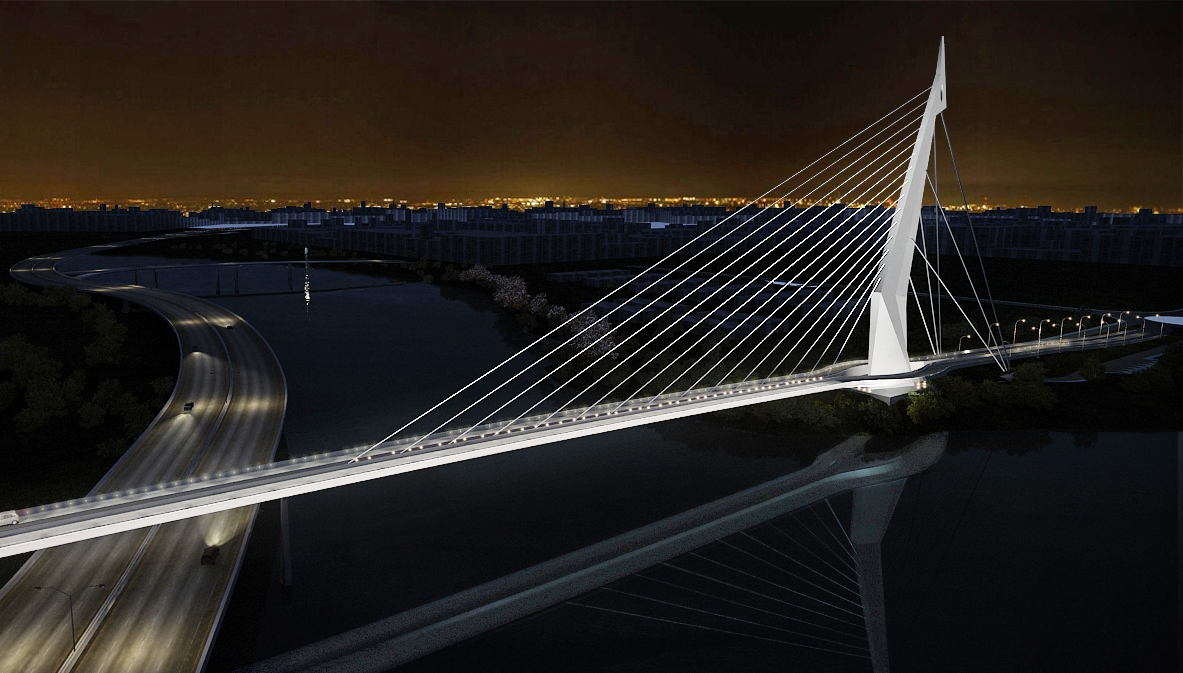 Ponte do Saber na Ilha da Universidade Federal do Rio de Janeiro.